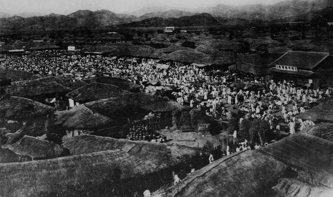 大邱市場 朝鮮写真帖 (朝鮮総督府, 1921)